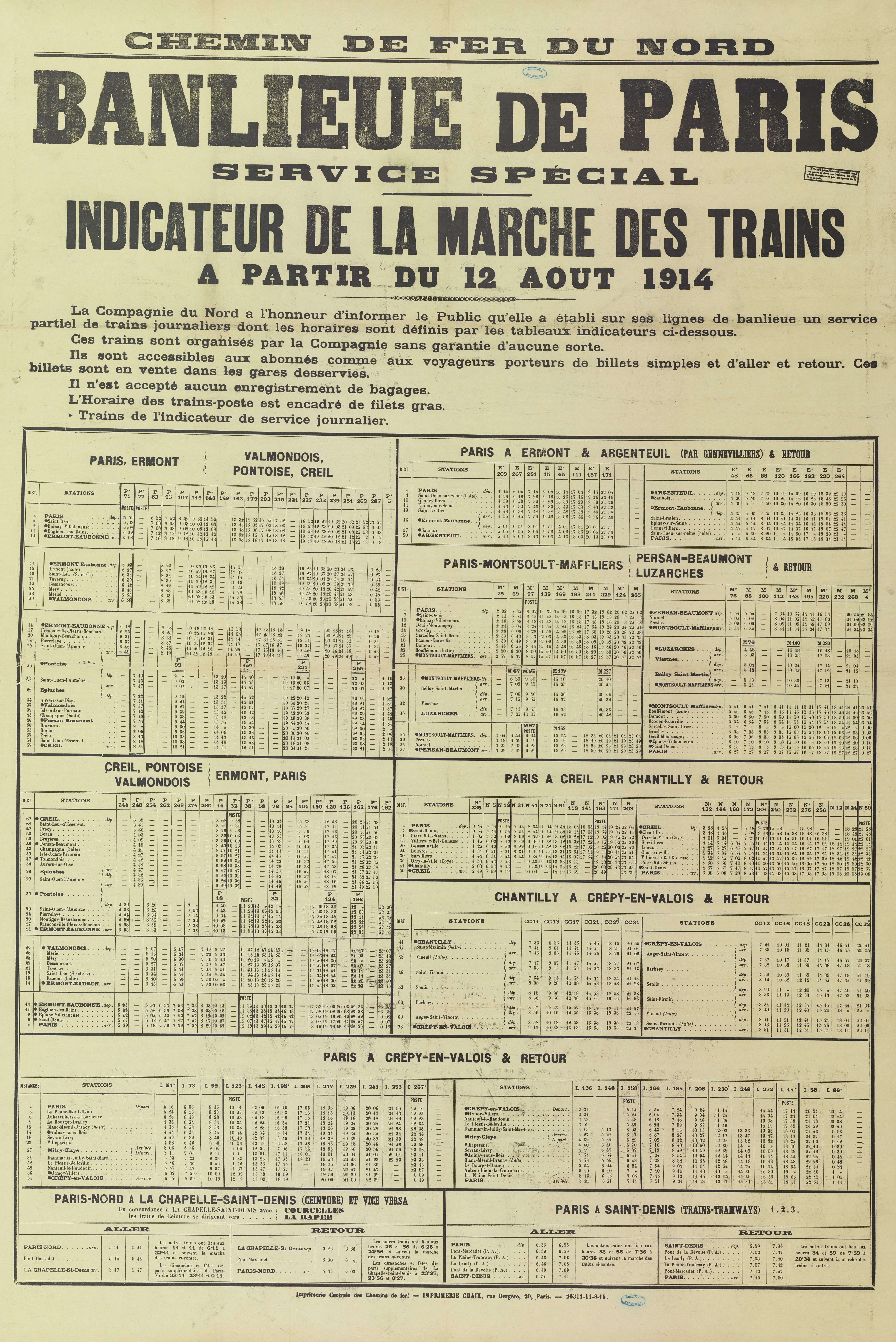 Affiche Chemins de fer du Nord. Banlieue de Paris, service spécial, Indicateur de marche des trains à partir du 12 août 1914